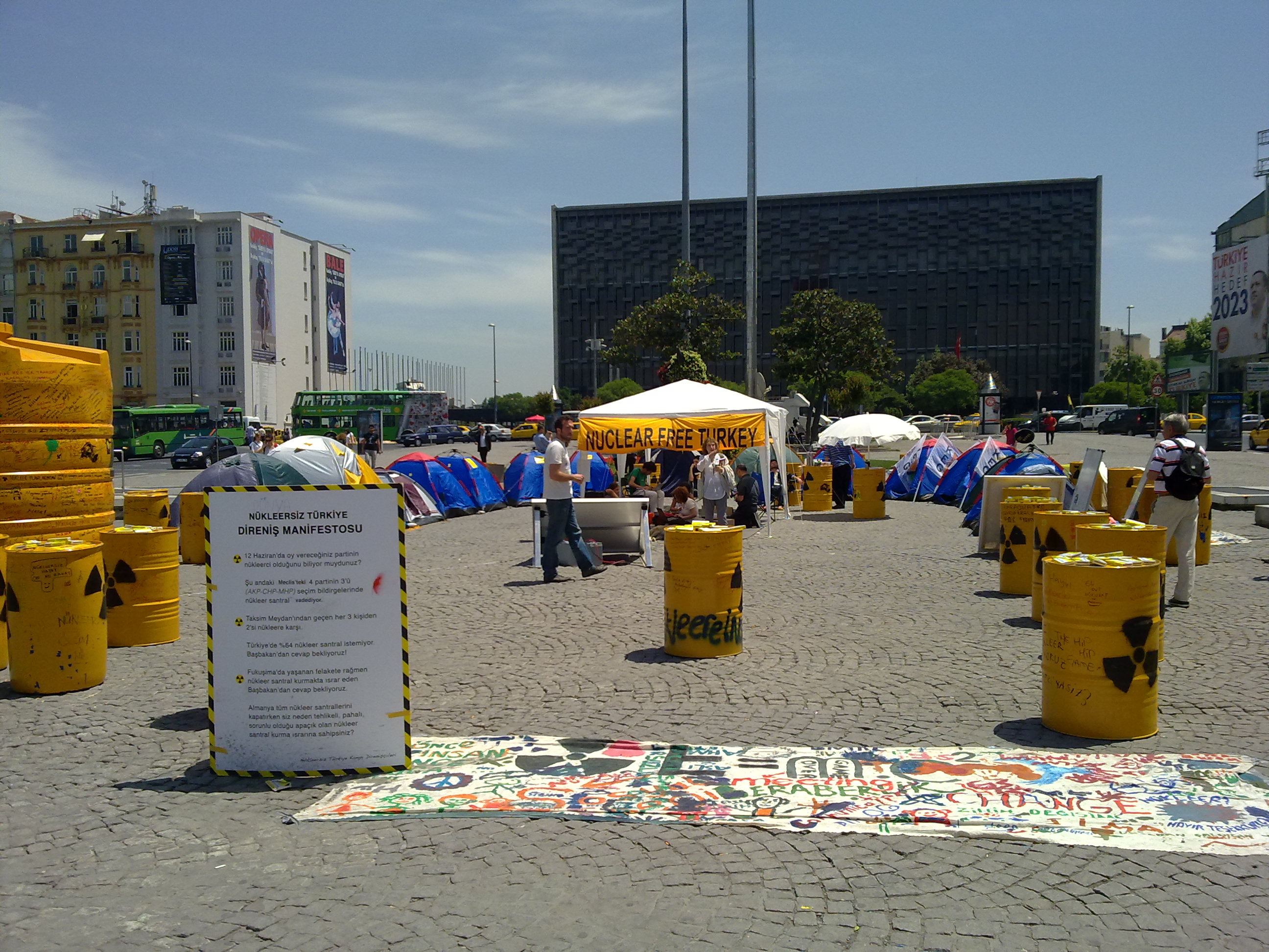 Taksim'de nükleere enerji karşıtı kurulan kamp.